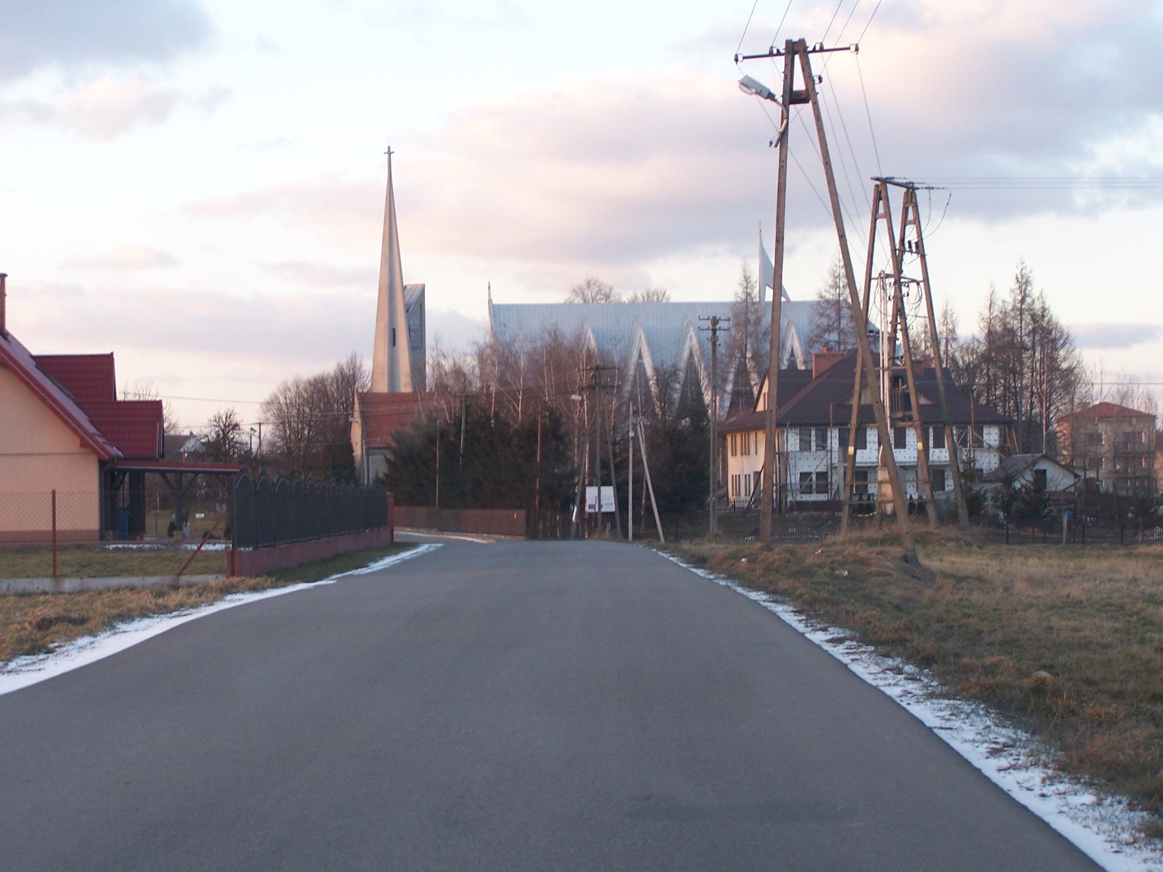 Kłaj, kościół parafialny i nowo budowana plebania